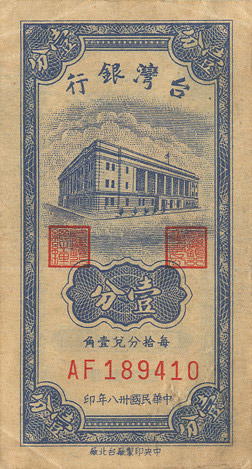 第二套直式新臺幣壹分券，1949年（中華民國38年）中央印製廠臺北廠印，中央有臺灣銀行總行大廈圖案。